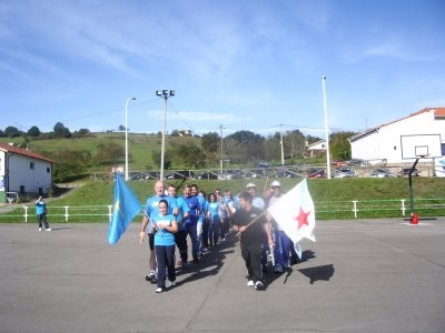 Desfile de presentación de les seleiciones. II Copa Cantábrica de Liriu/Billarda.